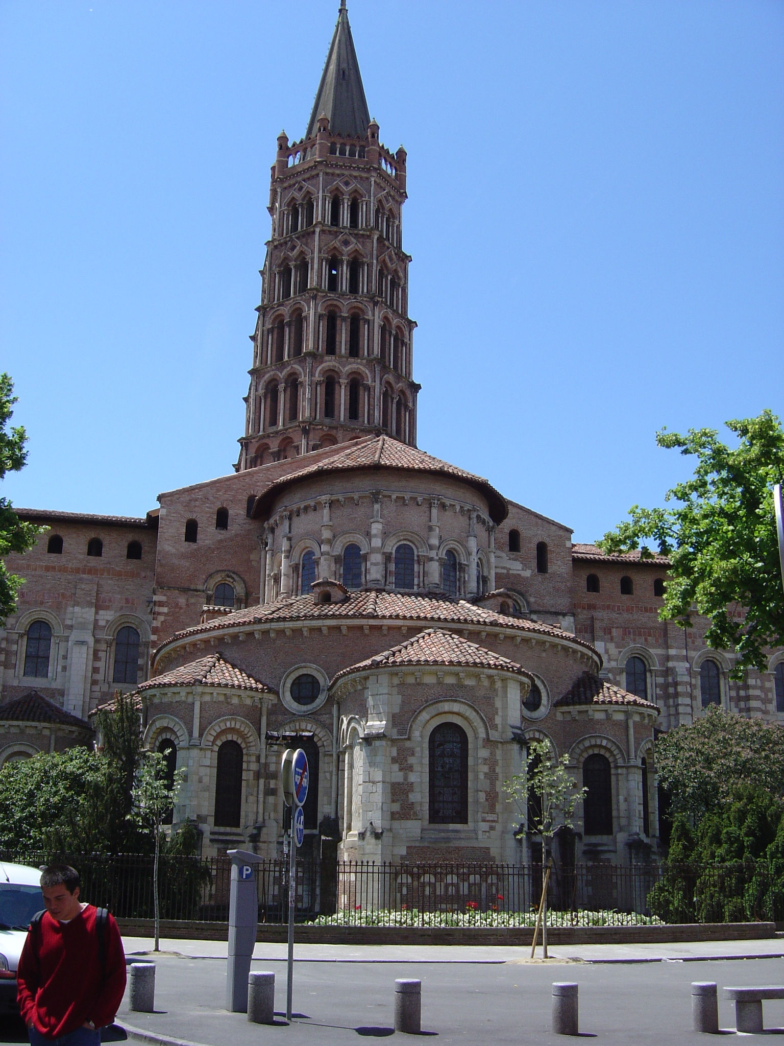 Chevet de la basilique Saint-Sernin de Toulouse auteur : Cornelis